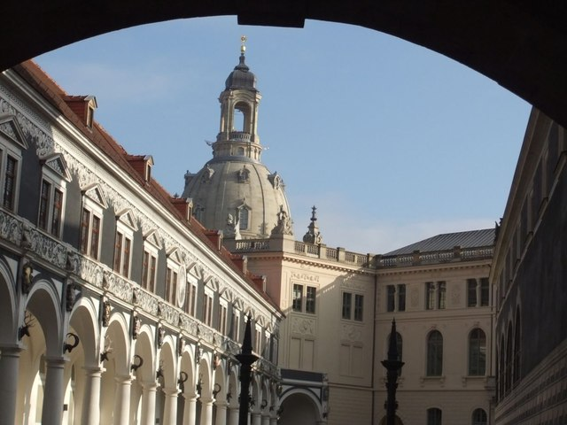 Blick auf Frauenkirche Dresden